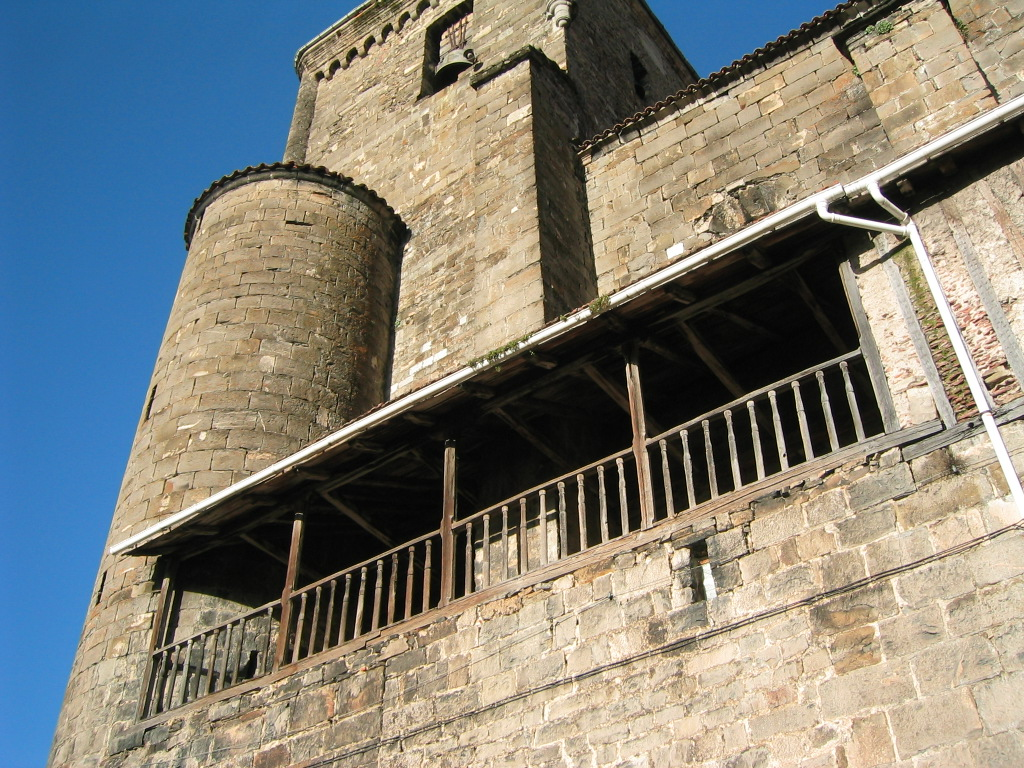 Detalle exterior de una iglesia en Isaba (Navarra).